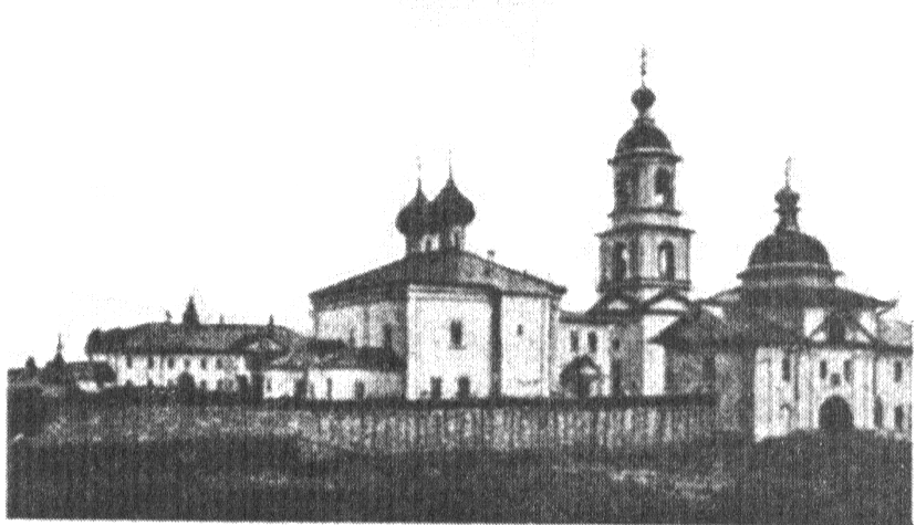 Сосновецкий Дионисиево-Глушицкий монастырь в Кадниковском уезде. Иллюстрация книги «Православные русские обители», стр. 89 илл.1